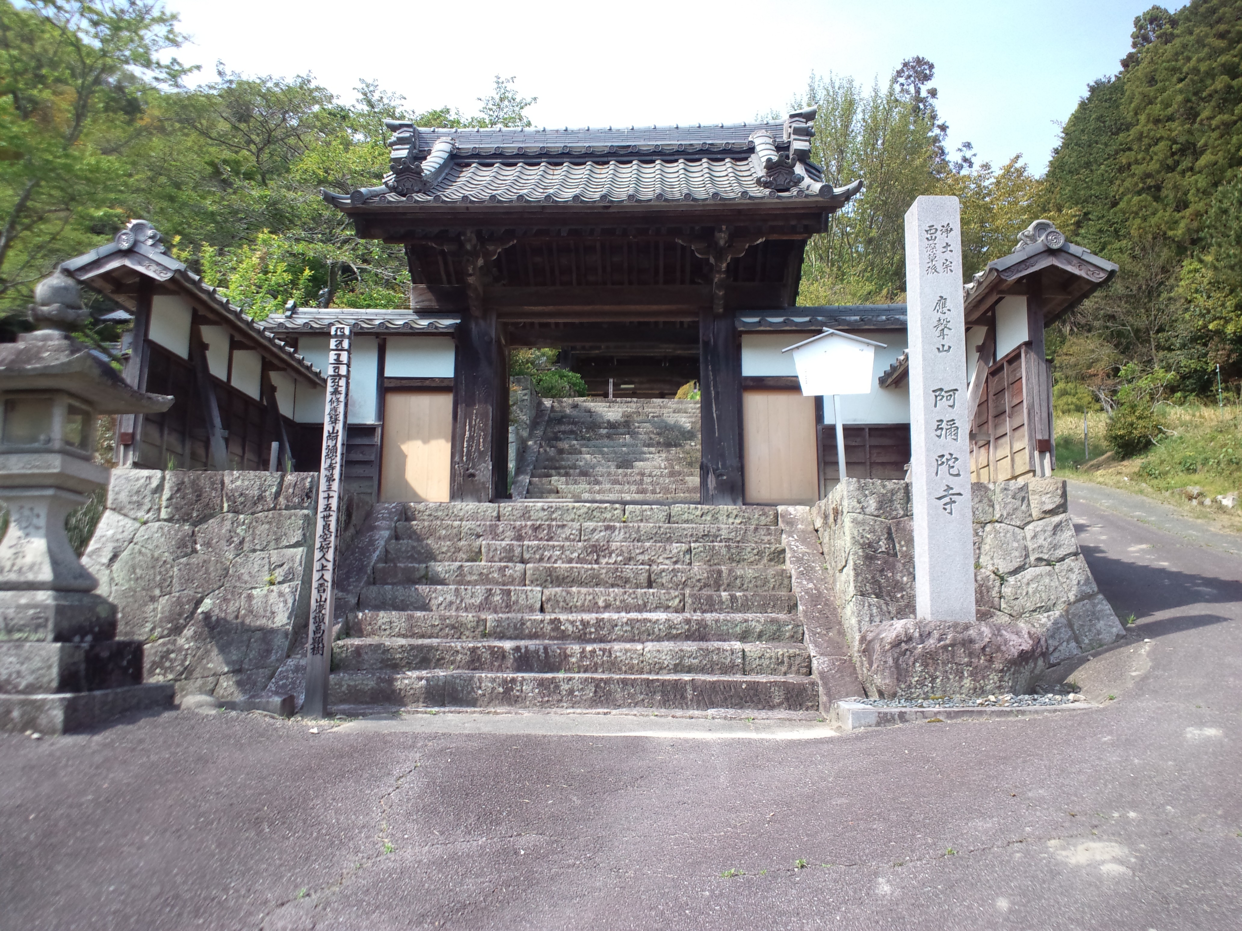 阿弥陀寺 入口